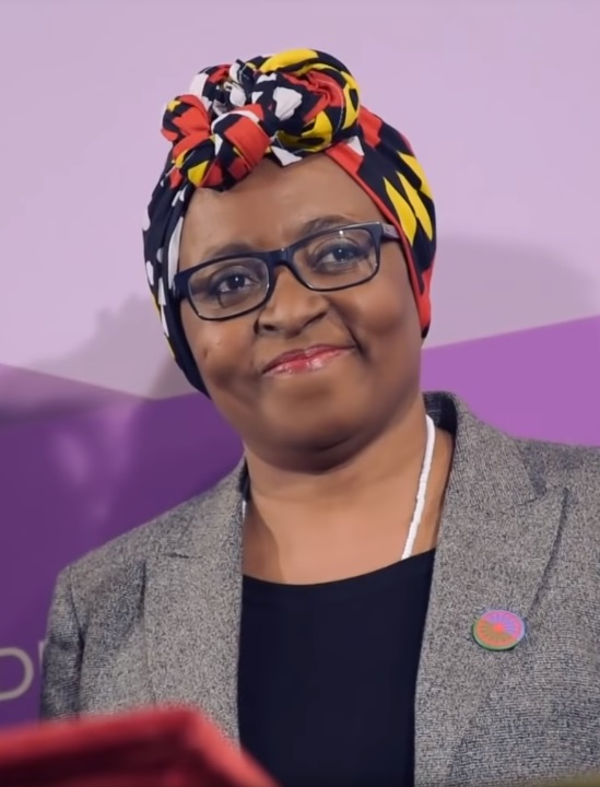 Vive desde dentro cómo fue el día en que el Ministerio de Igualdad echó a andar tras los pasos de la ministra Irene Montero.